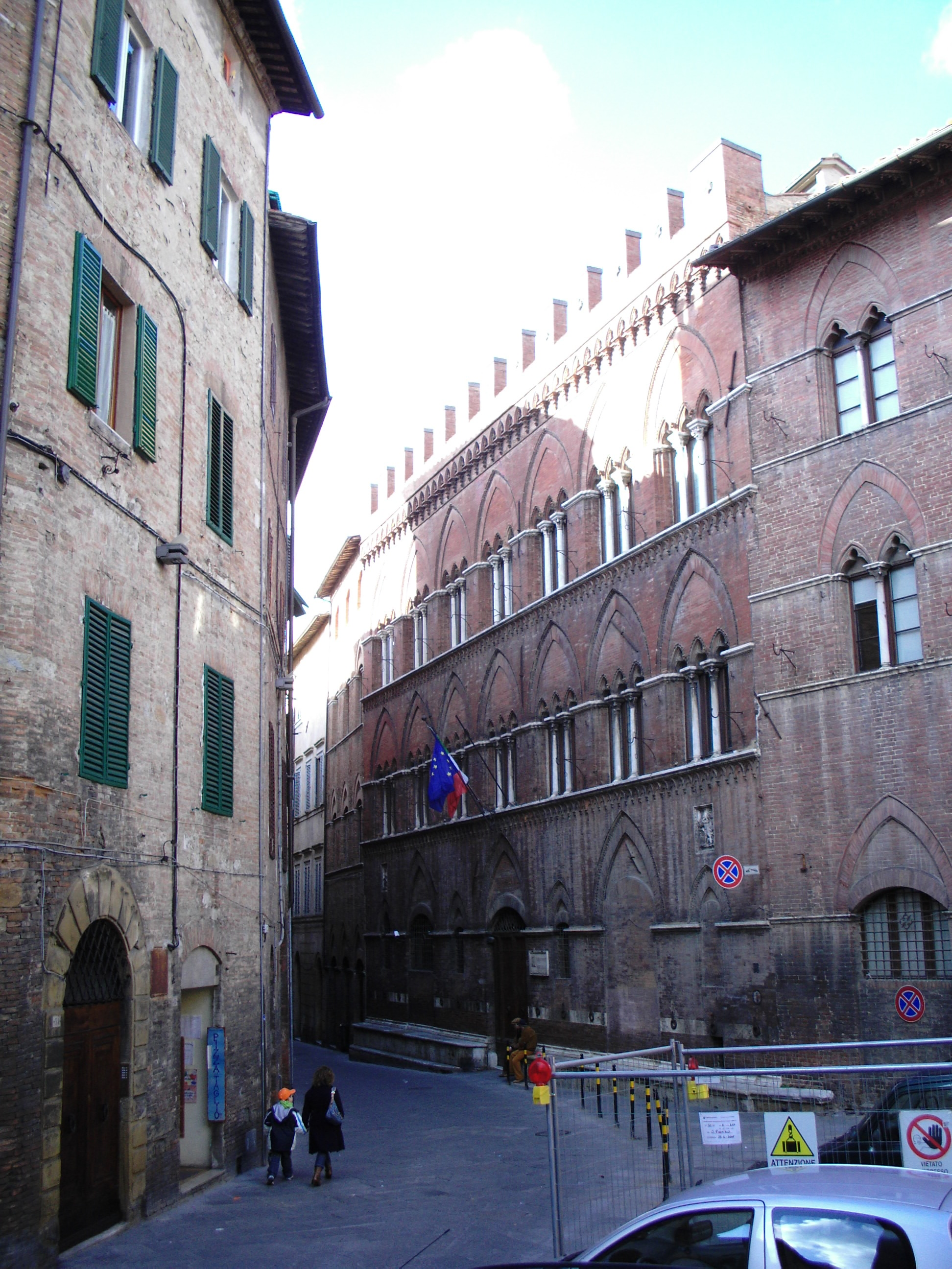 Siena, la Pinacoteca Nazionale